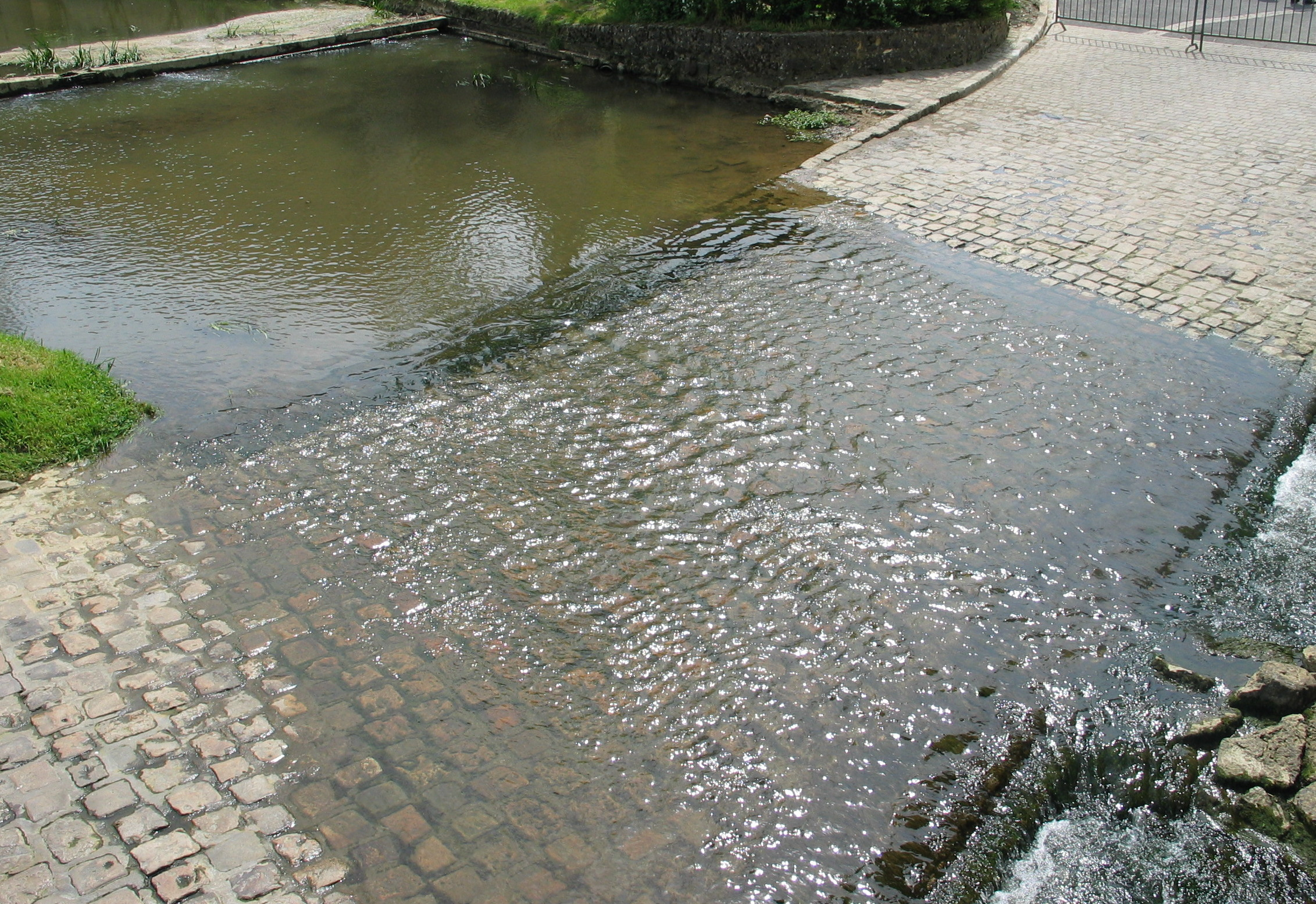 Un gué carrossable dans la commune de Mézilles en Bourgogne (France). Il se trouve à côté d'un pont du XIVe s..